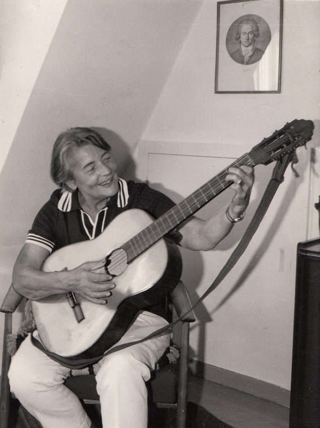 Inge von Wangenheim, Privataufnahme